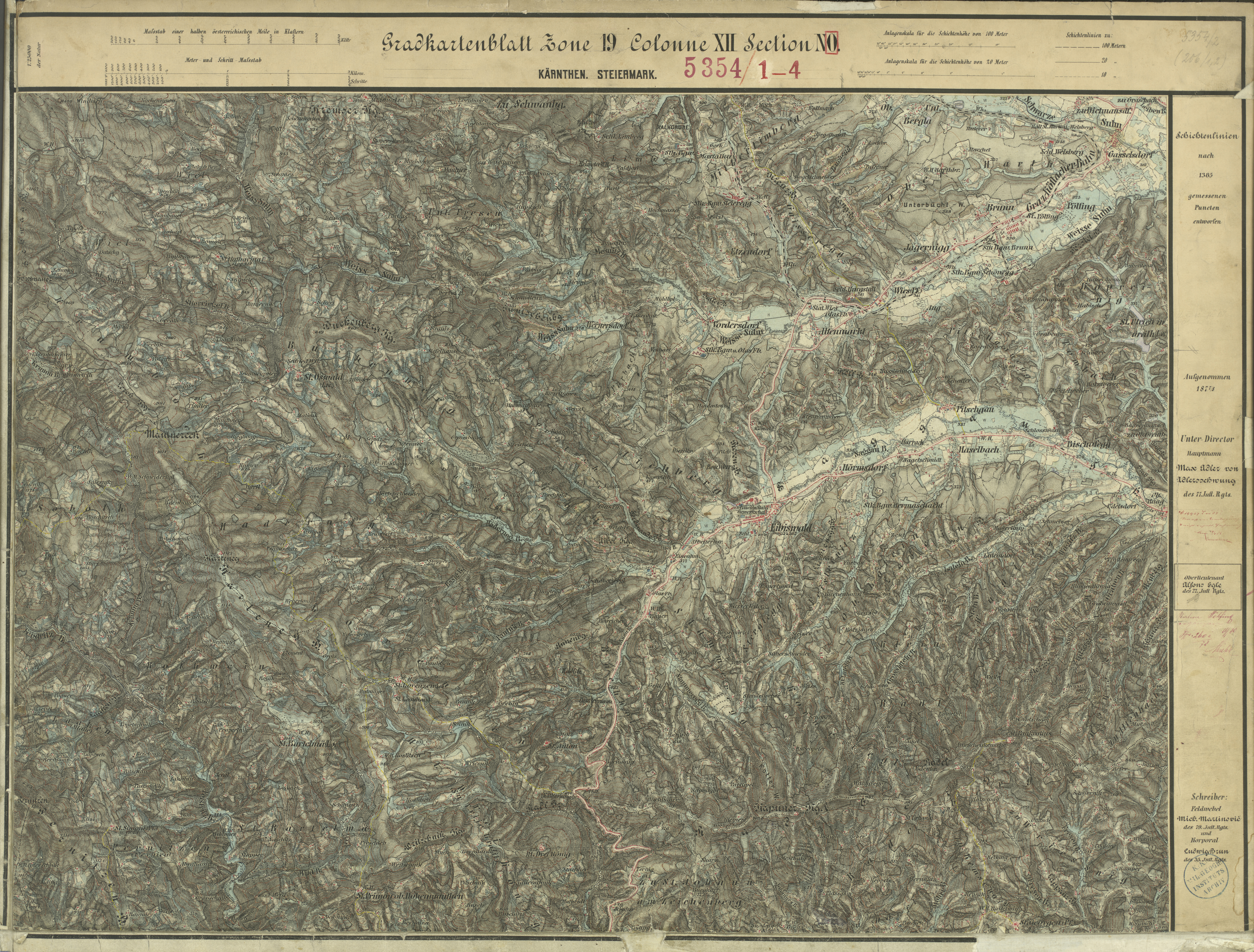 historische Landkarte: Gradkartenblatt Zone 19 Colonne XII Section NO (später 5354/2). Franzisco-josephinische (3.) Landesaufnahme der österreichisch-ungarischen Monarchie. Aufnahmeblatt 1:25.000. Aufgenommen 1878, Wies, Eibiswald, Soboth